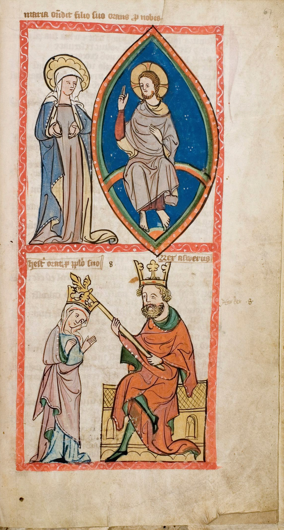 Speculum Humanae Salvationis, Westfalen oder Köln, um 1360. ULB Darmstadt, Hs 2505, fol. 67r